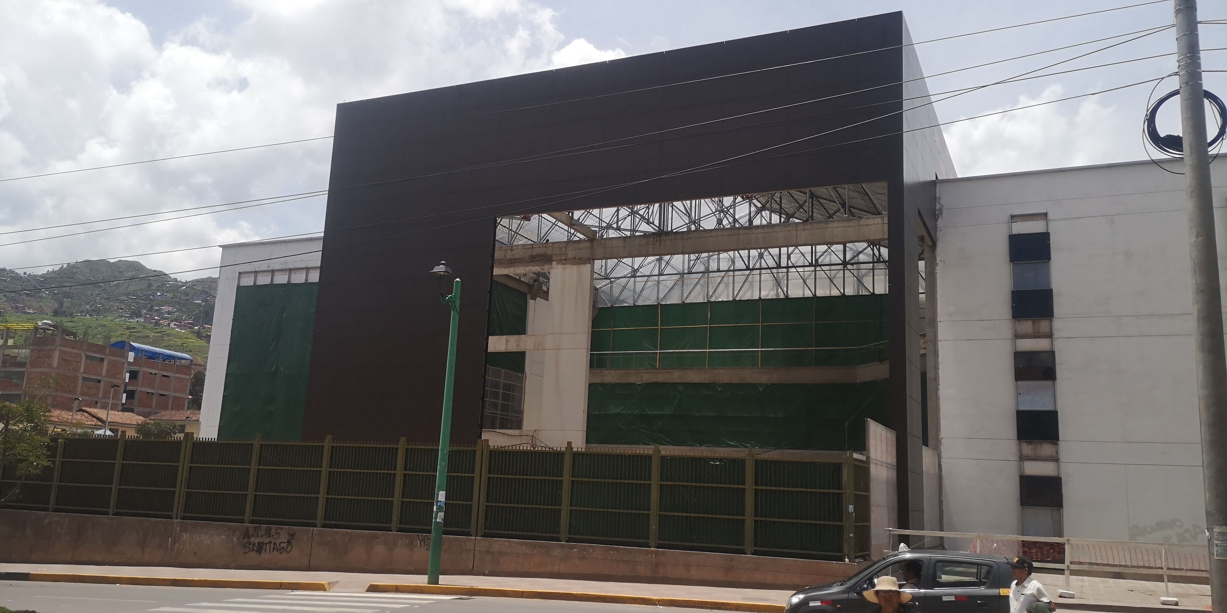 Nuevo hospital Antonio Lorena, Cusco, Perú